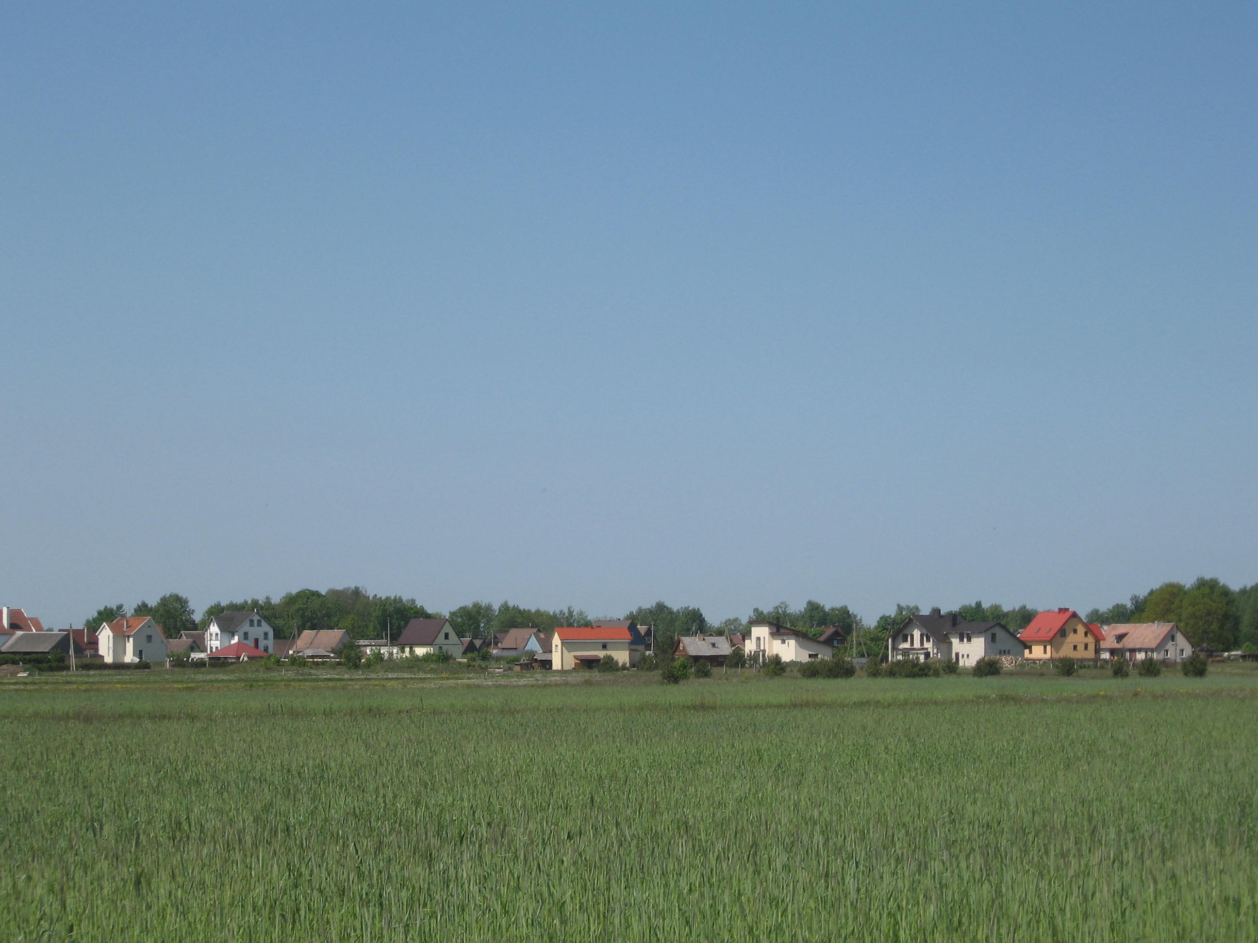 Kaimas Pagryniai.